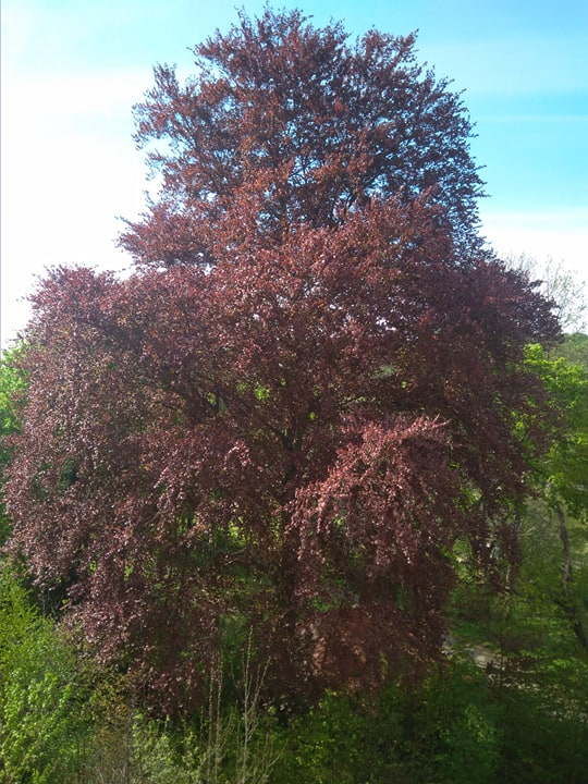 Památný strom Buk lesní Ignaze Röslera v Mikulášovicích